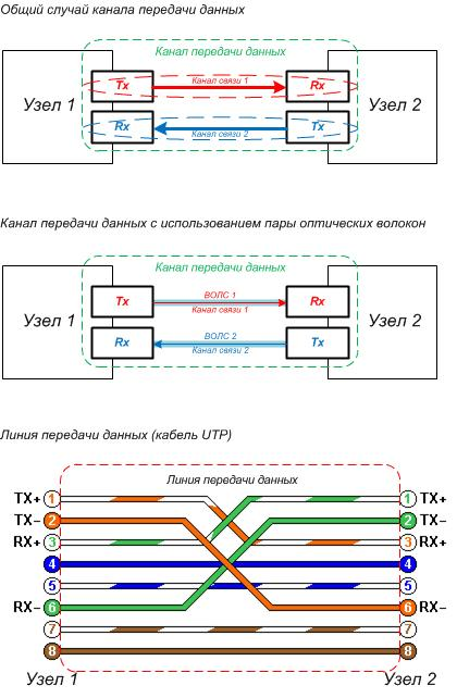 Иллюстрация канала передачи данных на примере ВОЛС и UTP